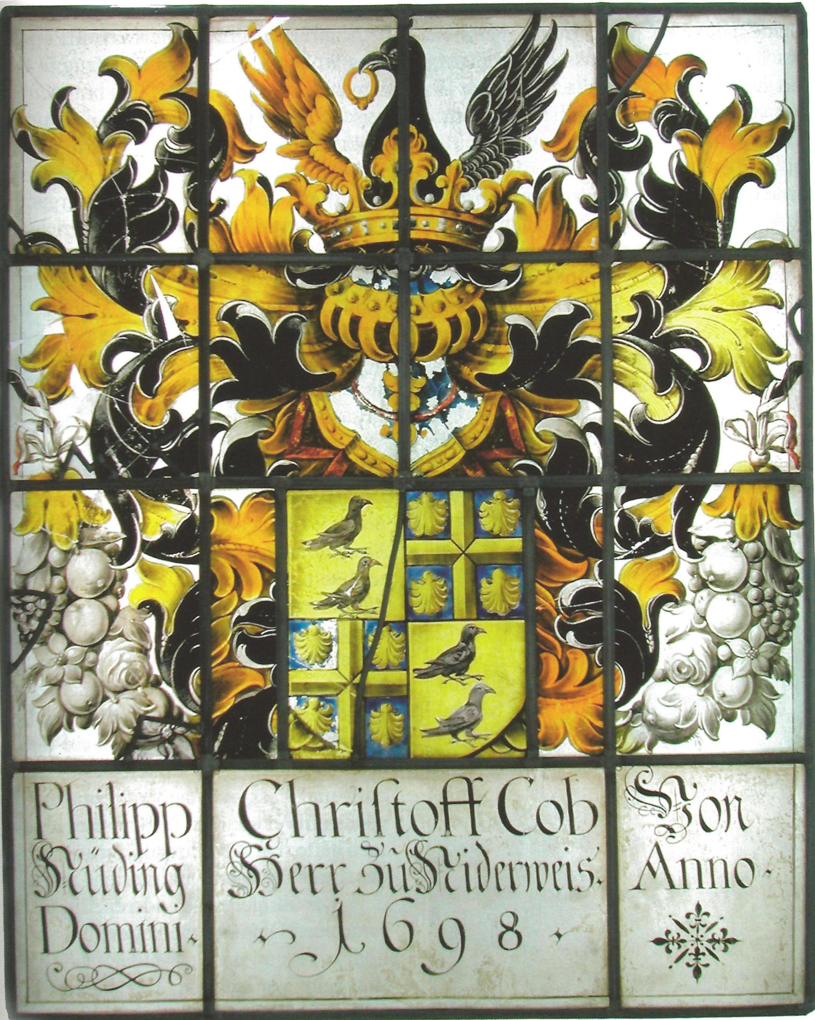 Kabinettscheibe Philipp Christoph Cob von Nüdingen, datiert 1698.